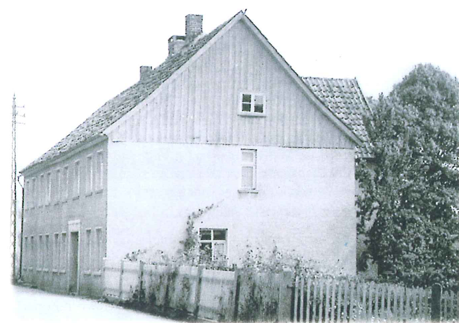 Rochus Hospital Wallstraße Steinheim ab 1858